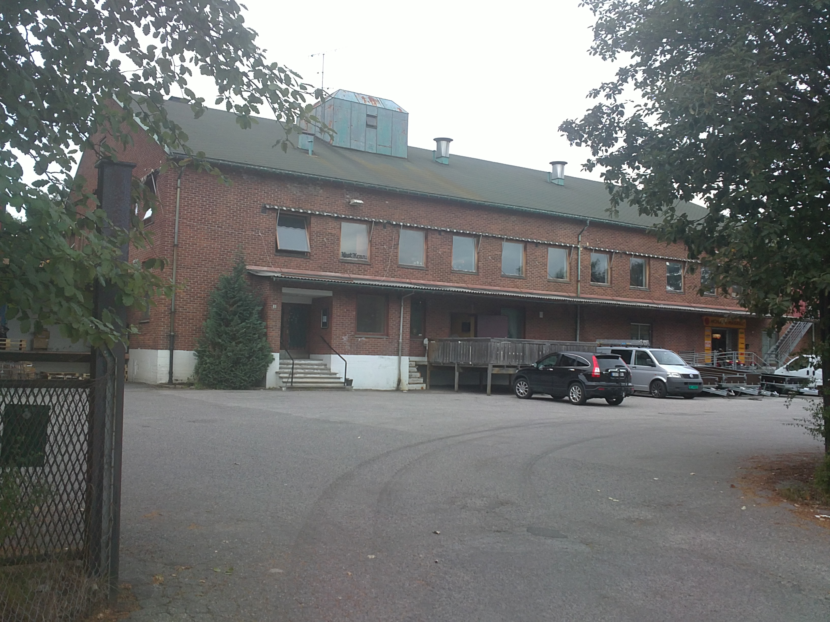 Bilde av den tidligere meieribygningen, Larvik